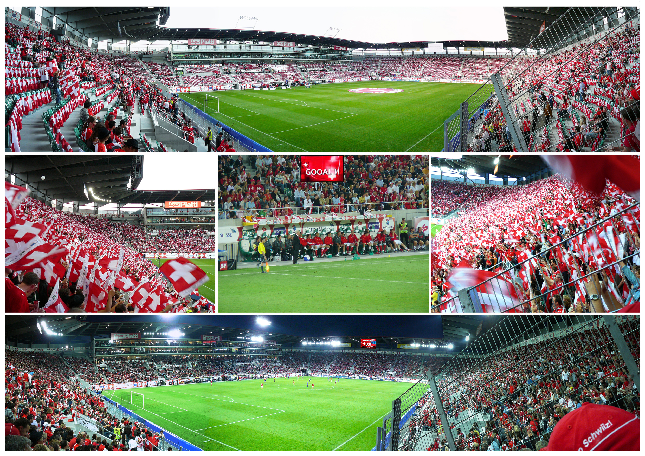 Erstes Spiel in der neuen AFG Arena, St. Gallen - Letztes Vorbereitungsspiel der Schweizer Nati zur EURO 2008